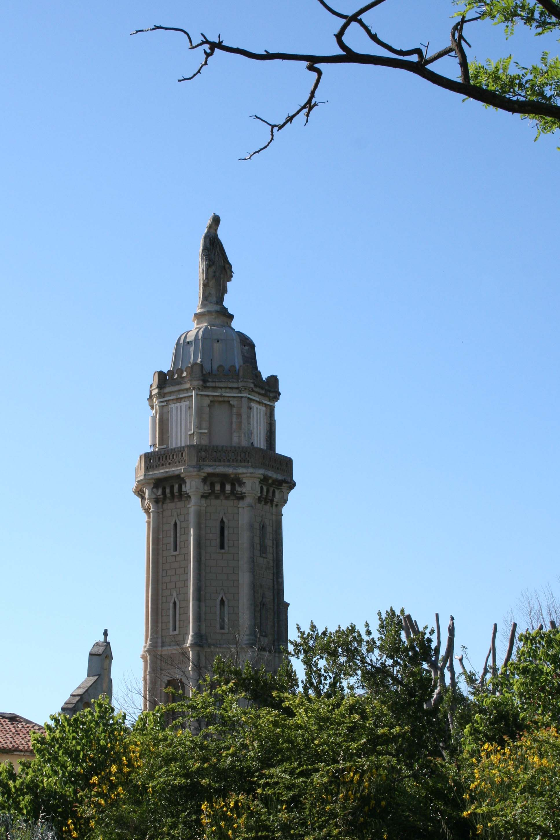 La tour sainte située à Marseille et classée monument historique. .